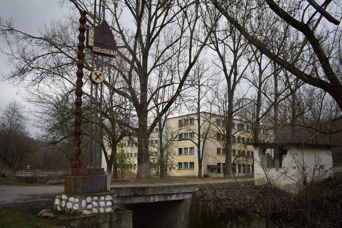 Mina Horăști după 60 de ani